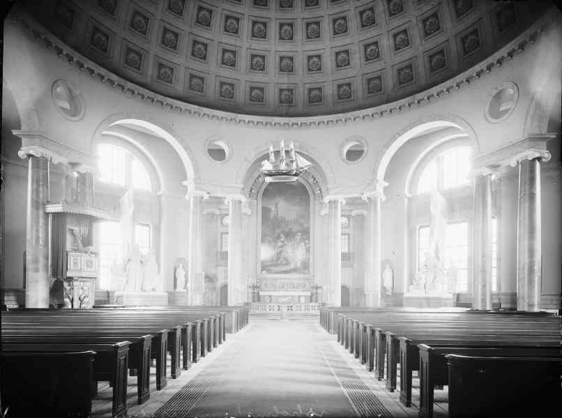 Interiör mot öster. Kategori: (02) InteriörerInteriör mot öster.